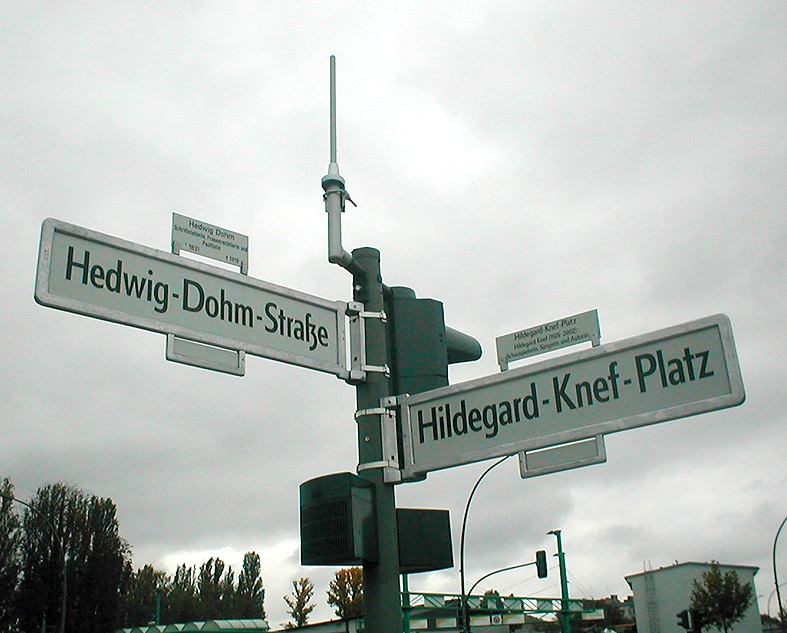 Hedwig-Dohm-Straße, Berlin - Ecke Hildegard-Knef-Platz am Bhf. Südkreuz seit 22.9.2007 Foto L. Wekenborg (StMatthaeus)